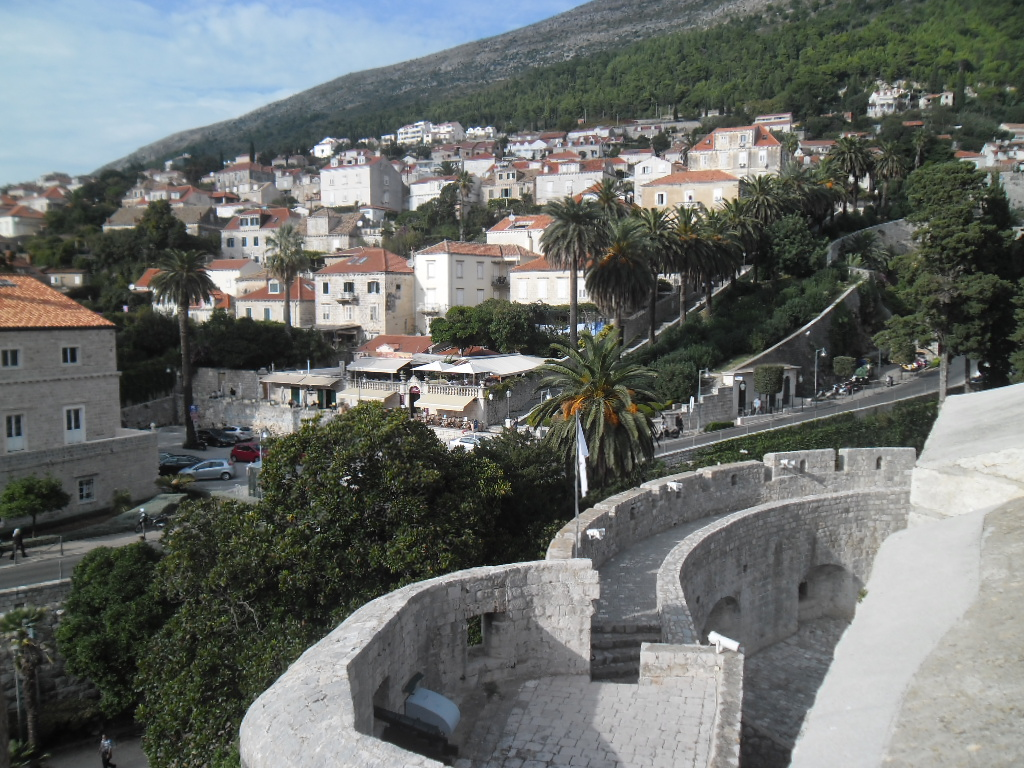 Dubrovnik